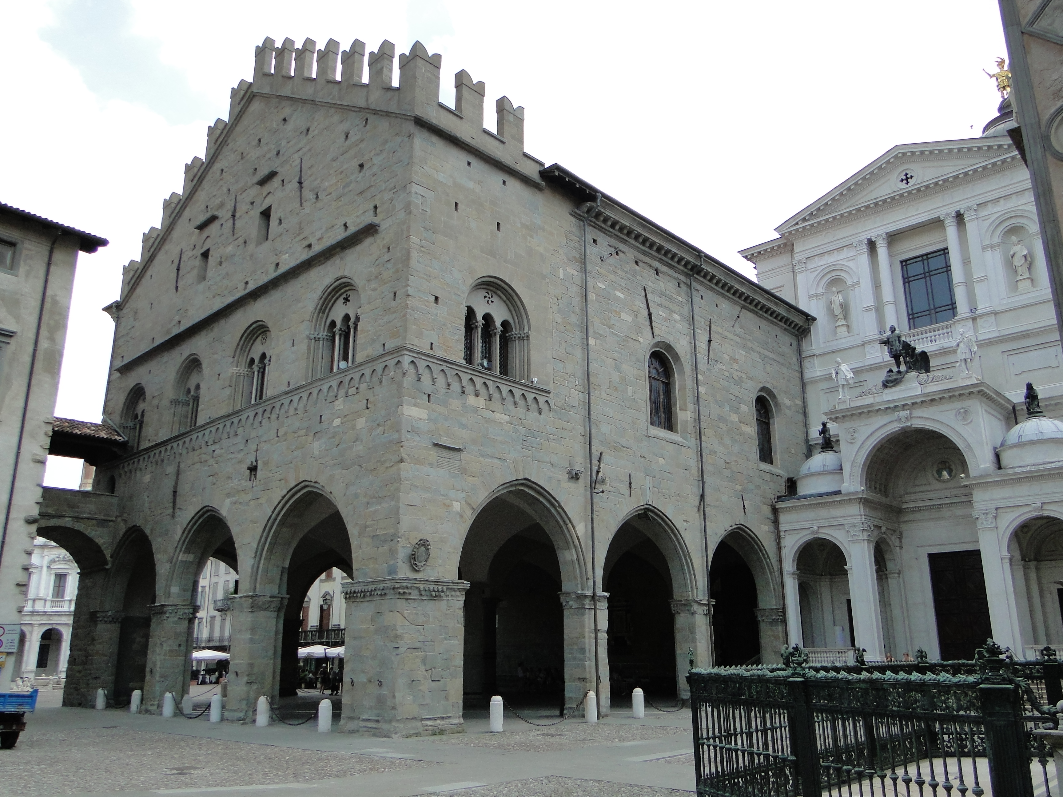 Palazzo della Ragione visto da Piazza Duomo, Bergamo, Italia